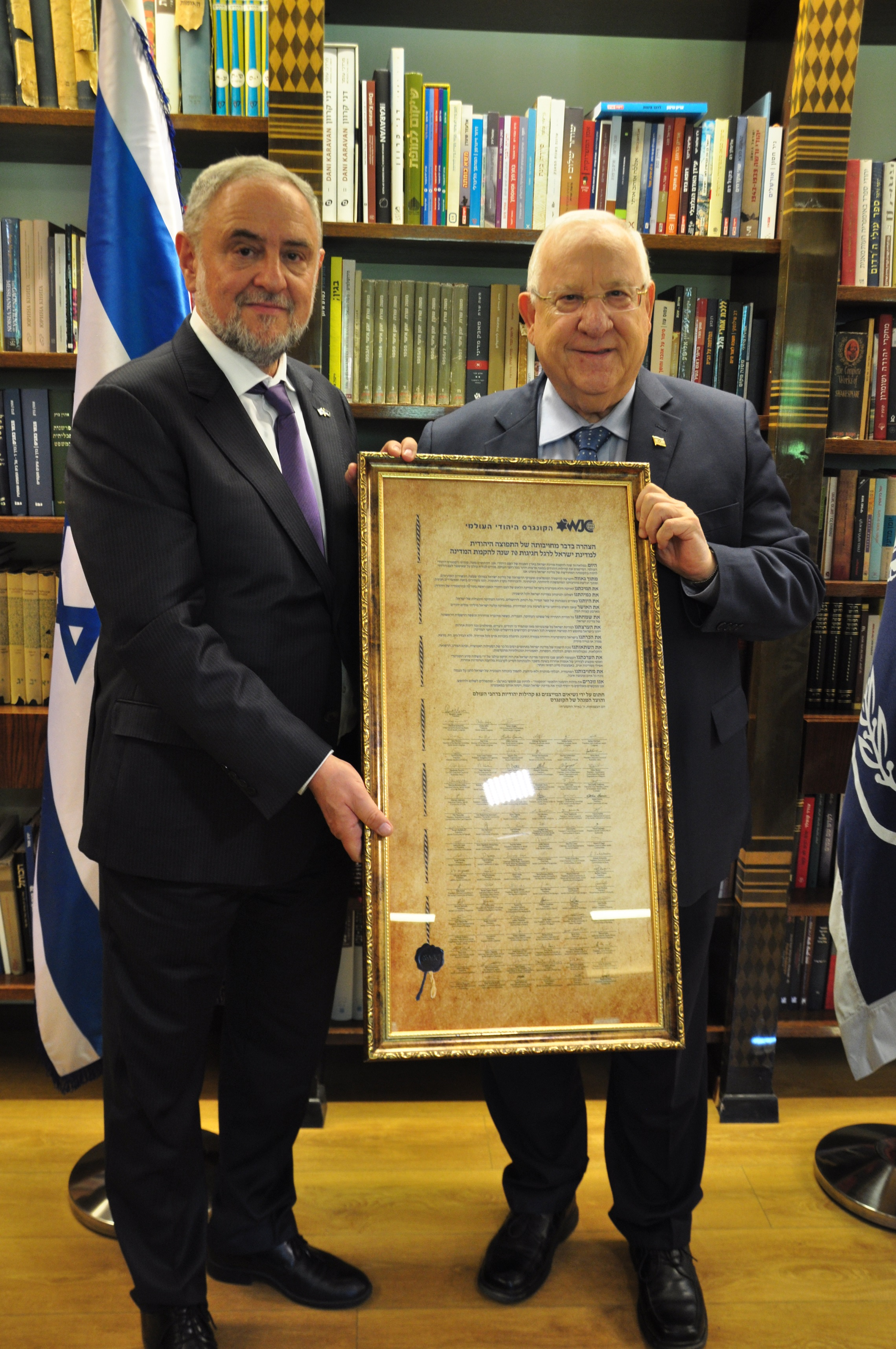 ראובן ריבלין נשיא מדינת ישראל מקבל לידיו הצהרה חגיגית בדבר מחויבותה של התפוצה היהודית למדינת ישראל מטעם הקונגרס היהודי העולמי בתמונה מימין לשמאל ראובן ריבליו ורוברט זינגר מנכ"ל הקונגרס היהודי העולמי